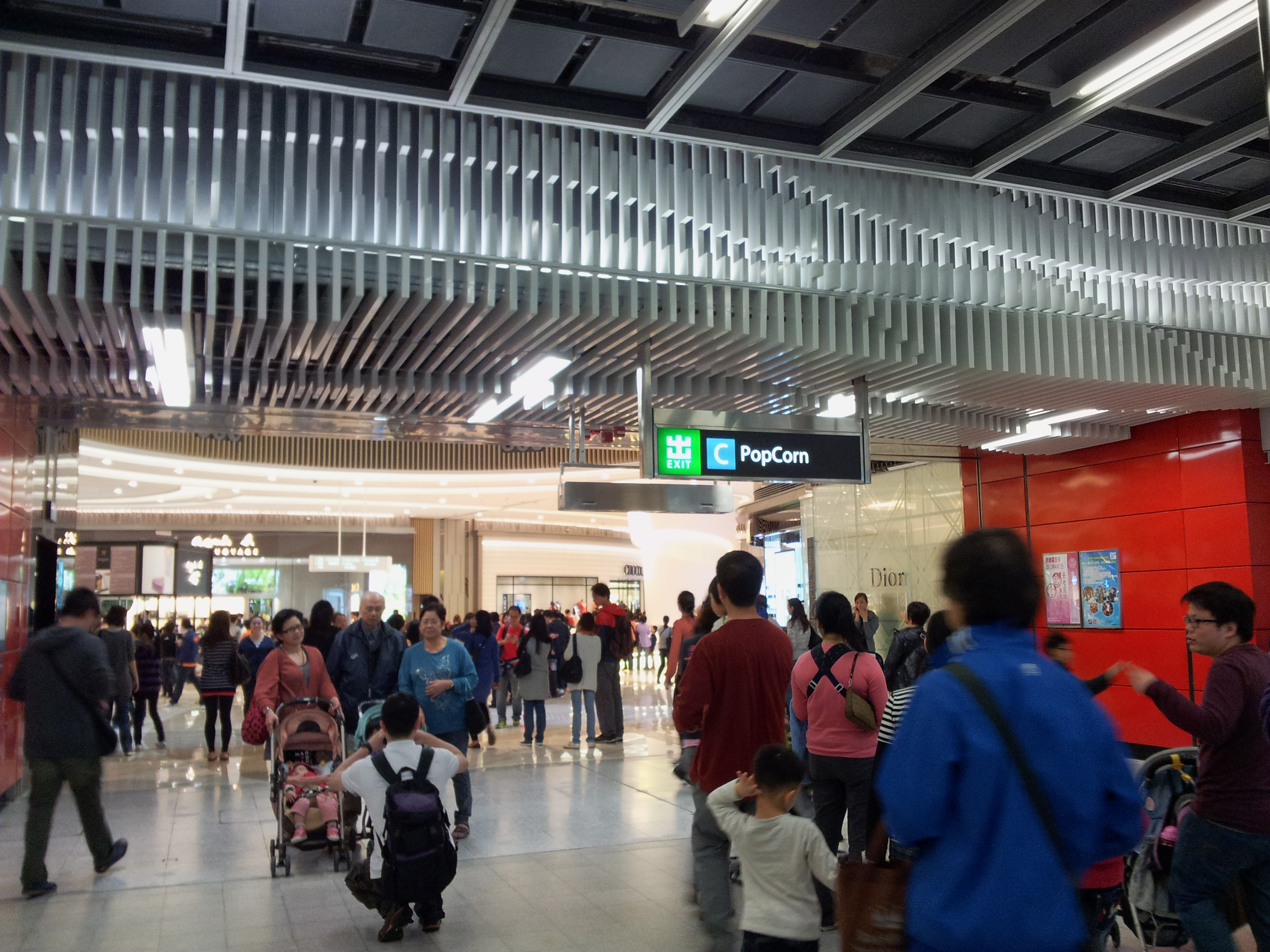 港鐵將軍澳站通往PopCorn商場的出口